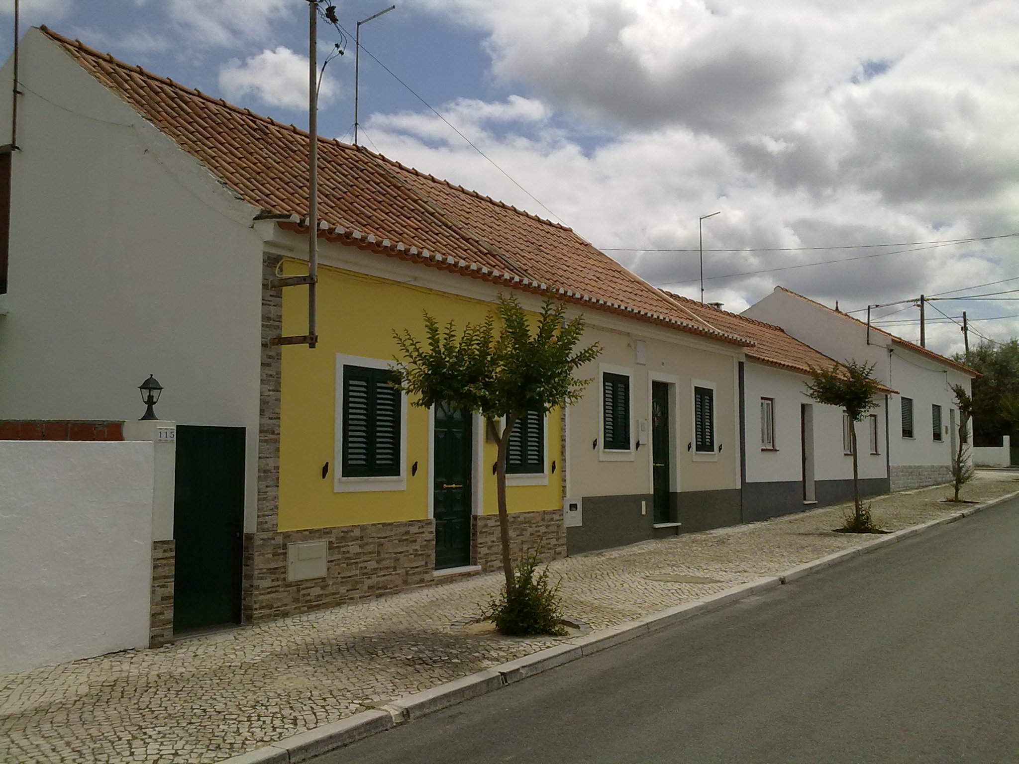 Couço (casario), Portugal.